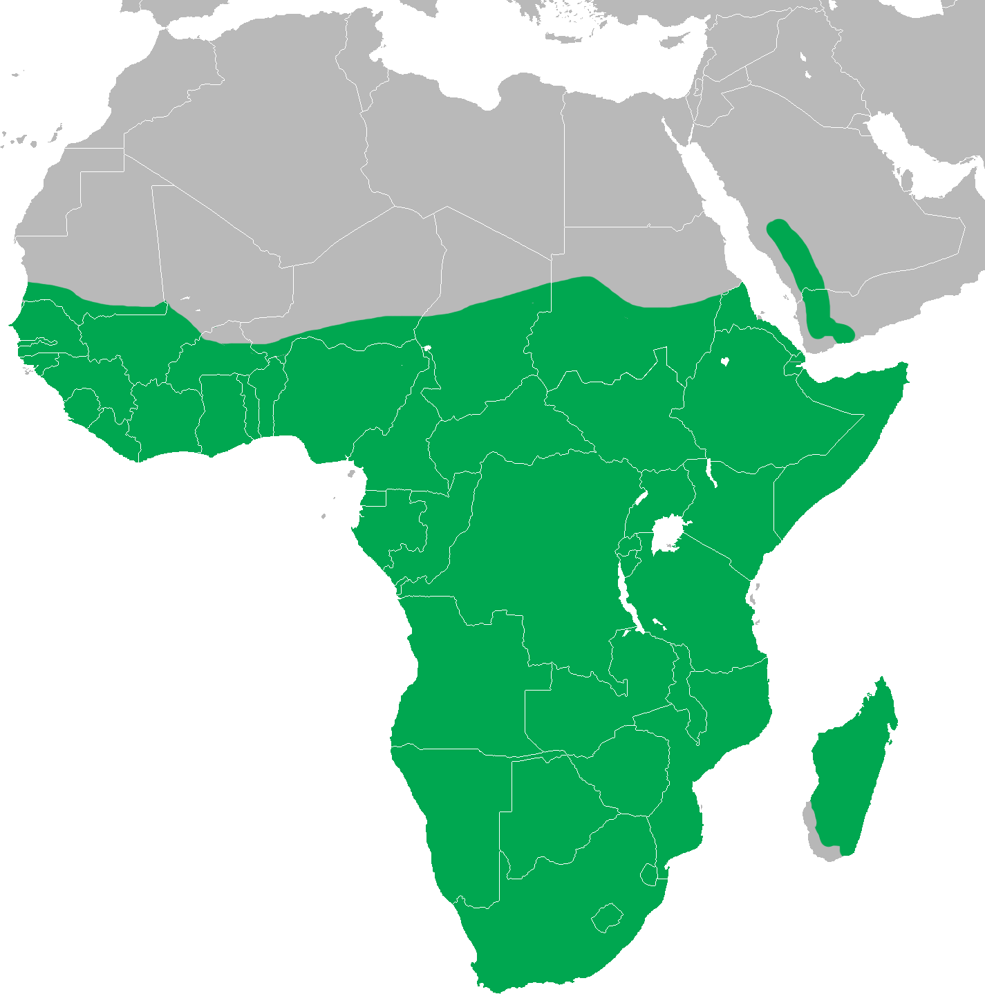 Distribution Scopus umbretta, based on